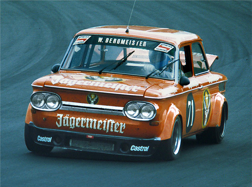 Willi Bergmeister und sein NSU TT 1975 auf dem Nürburgring (Südkehre)